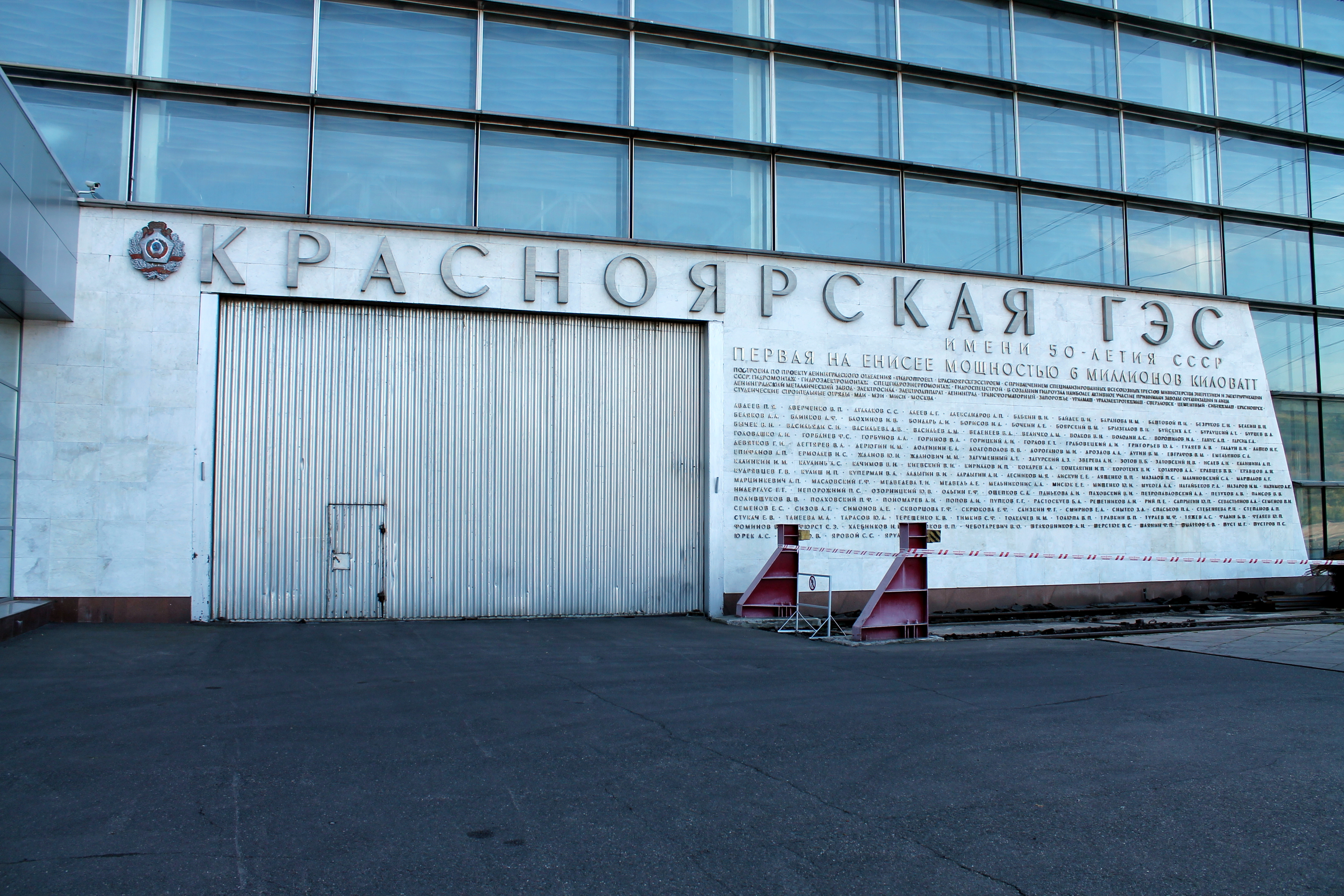 Памятная доска Красноярской ГЭС